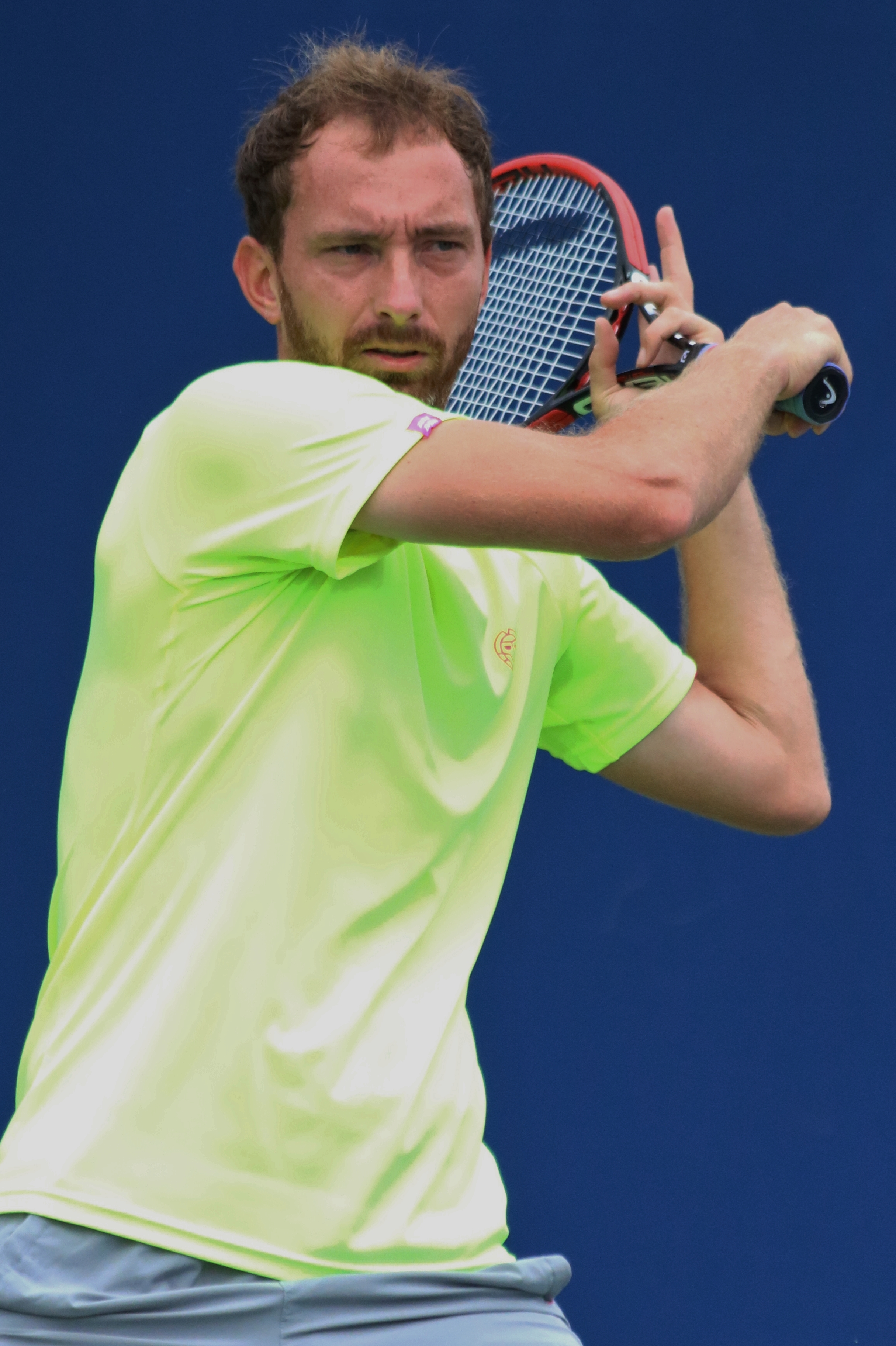 Middelkoop US16 (14)